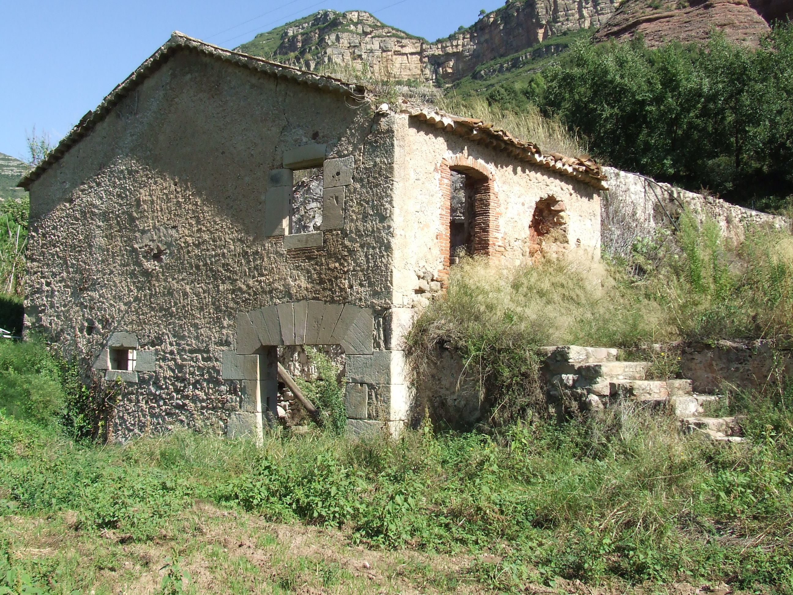 El Molí de la Madella (Riells del Fai, Bigues i Riells, Vallès Oriental)